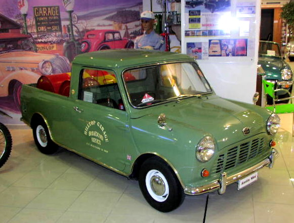 Austin Mini Pickup